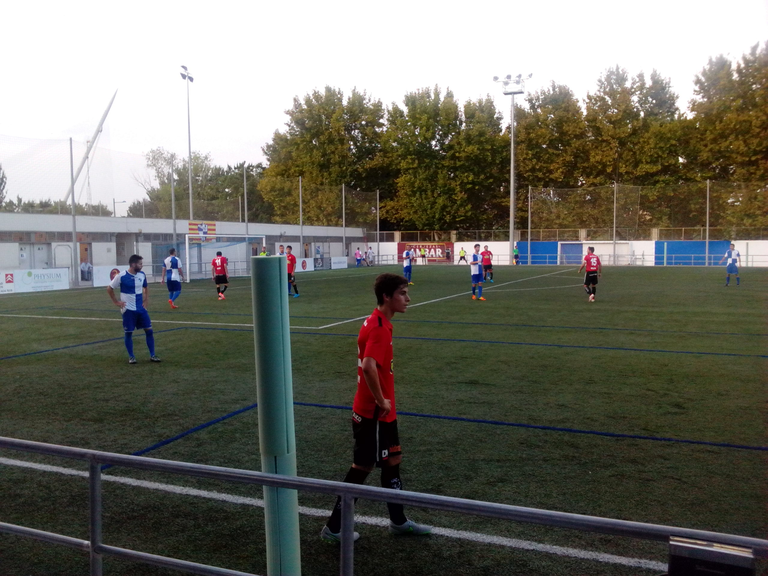 Aragonés: Copa d'o Rei